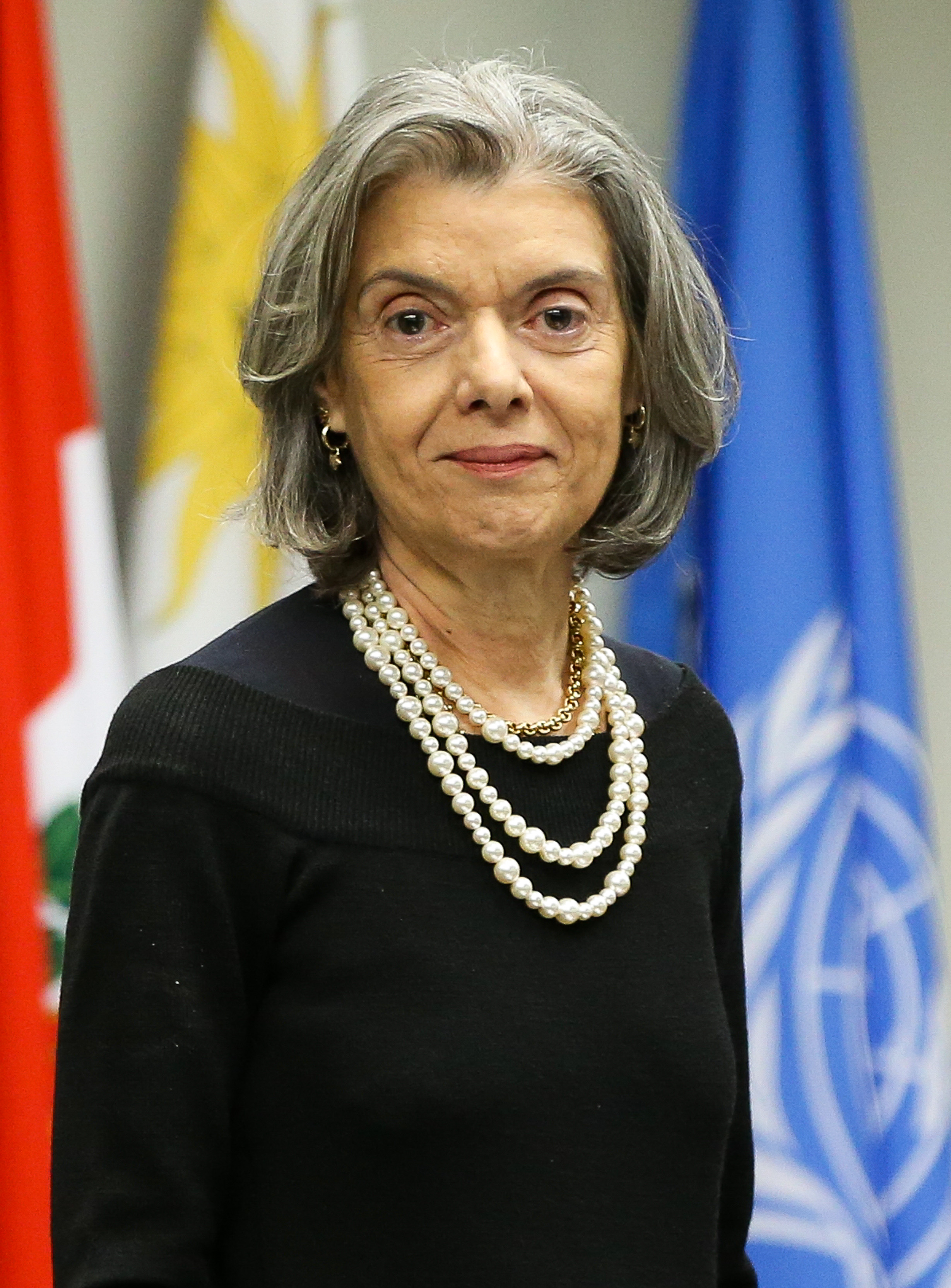 A presidente do Supremo Tribunal Federal (STF), ministra Cármen Lúcia, participa do 23º Encontro de Presidentes e Juízes de Tribunais Constitucionais da América Latina, no STF